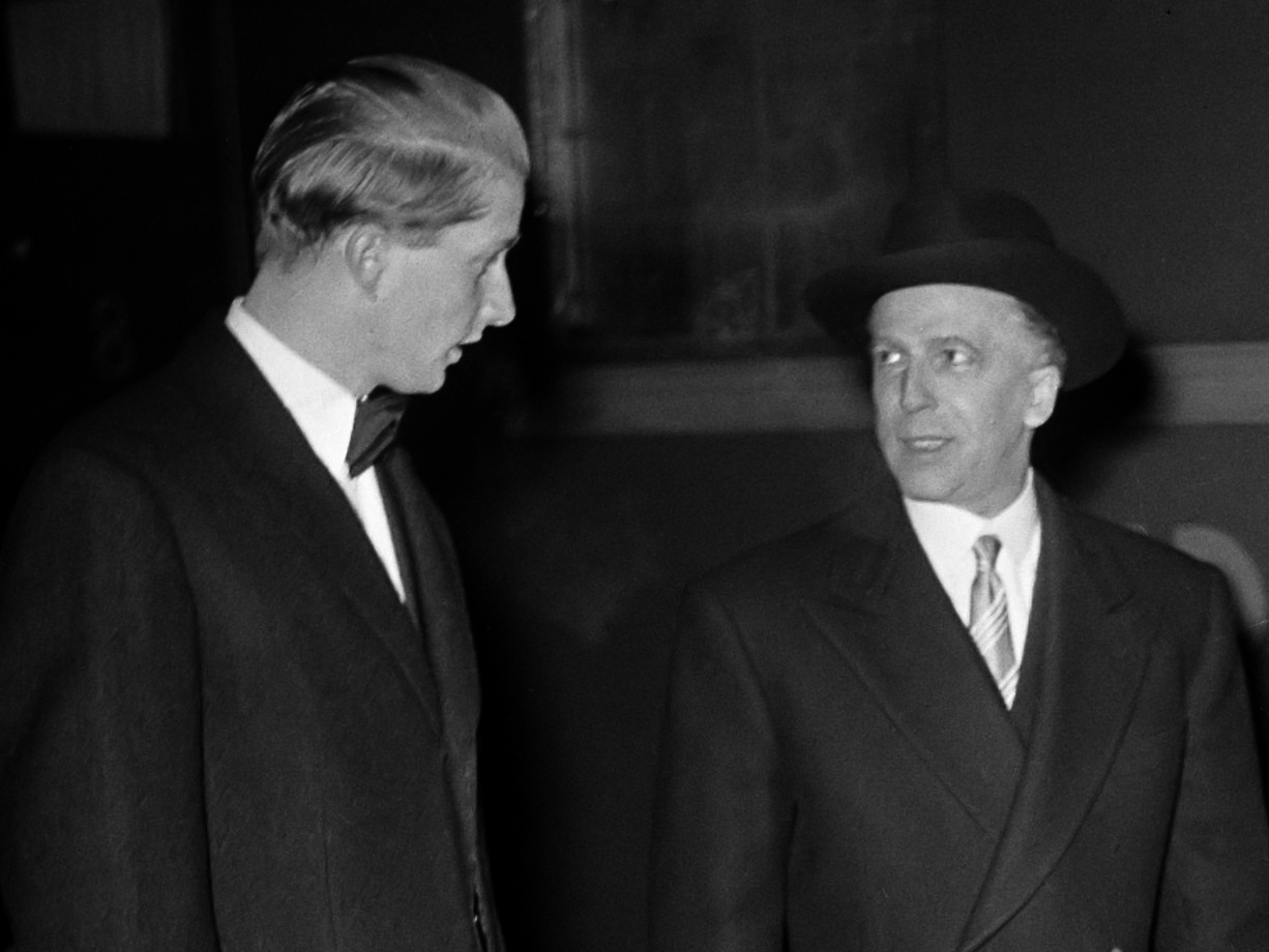 Frans Mikkenie ontvangt prins Albert van Belgiè 18 januari 1953